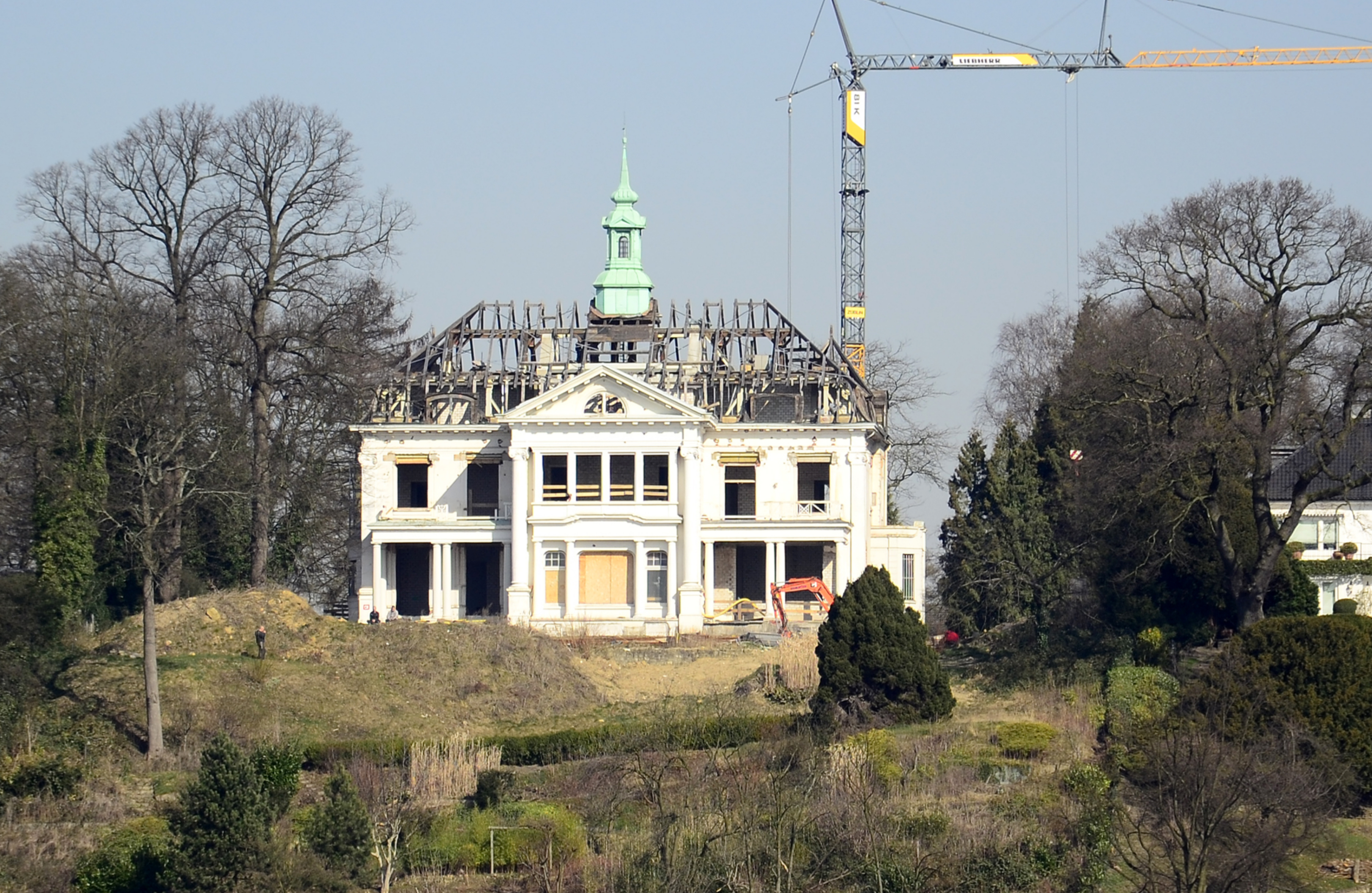 Elbchaussee 239 Villa de Freitas bei sanierungsarbeiten im März 2015 This is a photograph of an architectural monument.